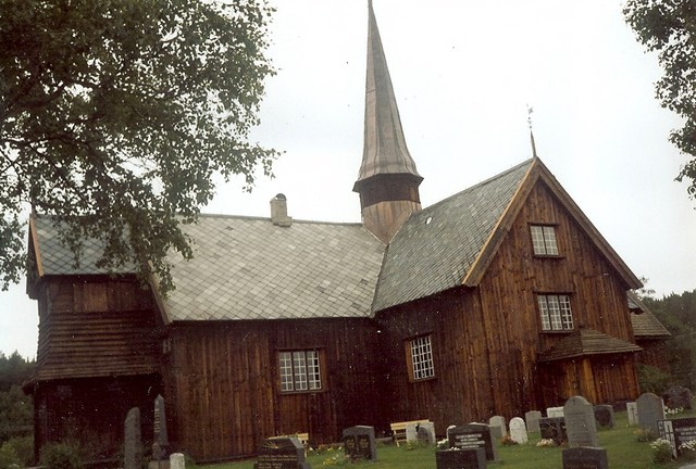 Innset kirke